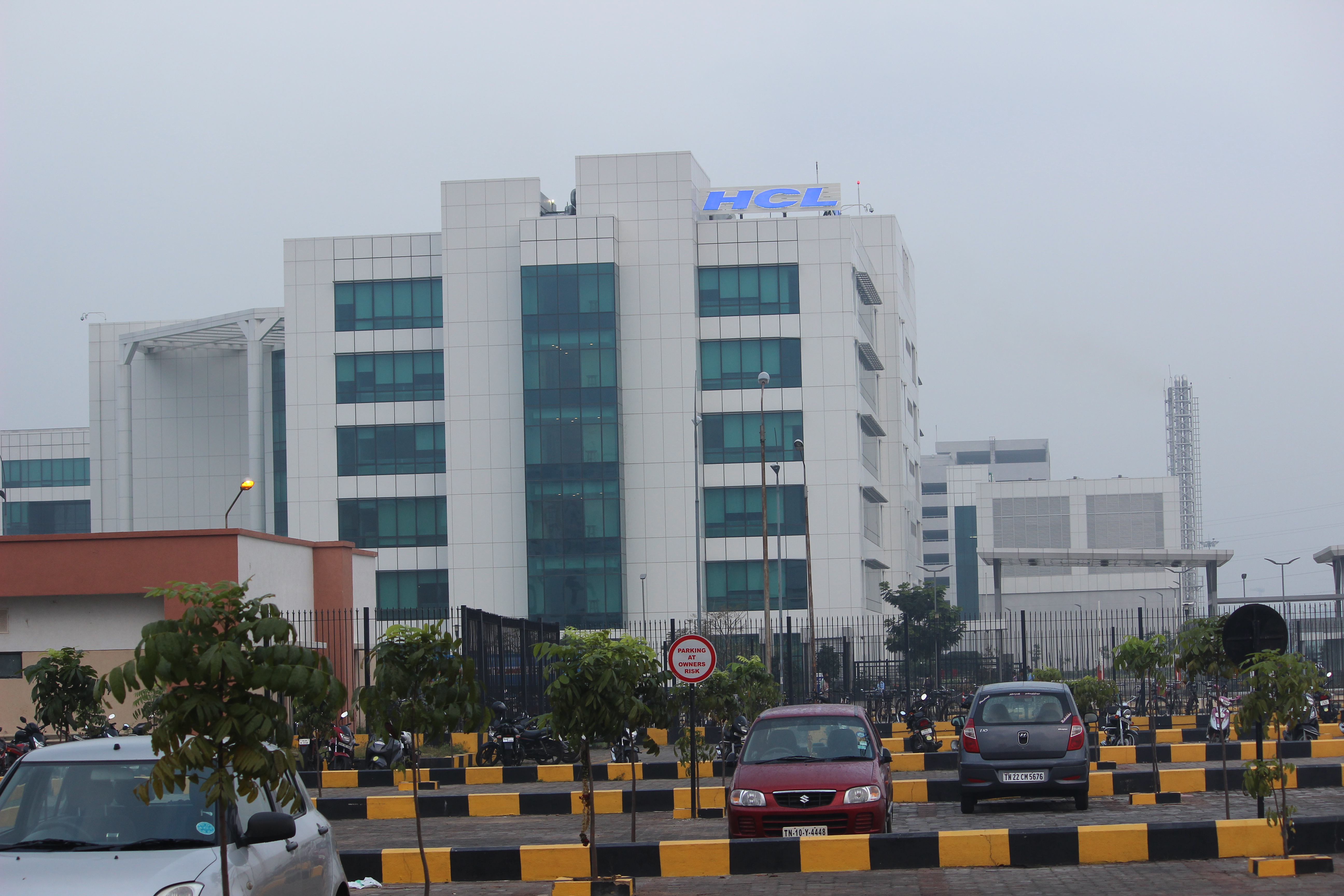 எச். சி. எல். டெக்னாலஜிஸ்,சோழிங்கநல்லூர்